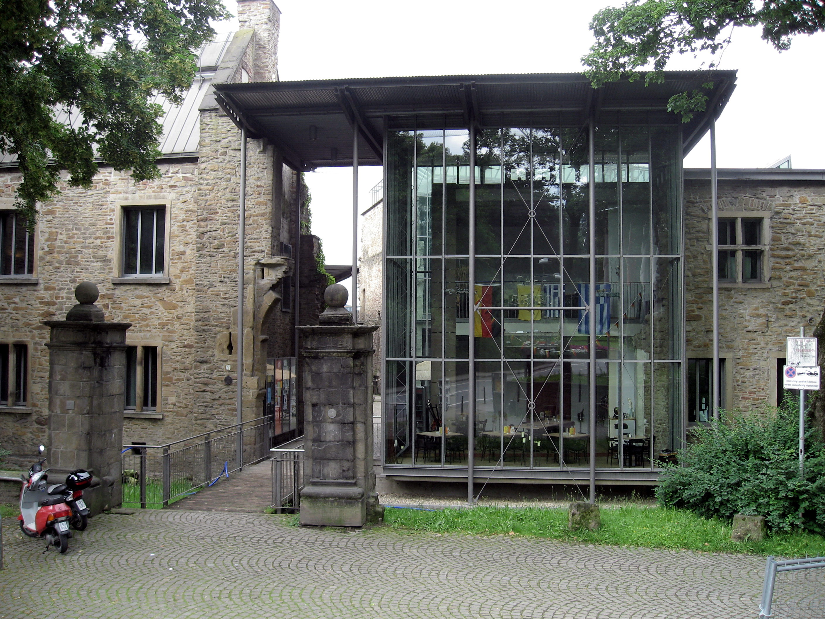 Das Haus Witten, auch Burg Berge zu Witten, ist ein Rittersitz im Süden der Stadt Witten, Ruhrstraße 86